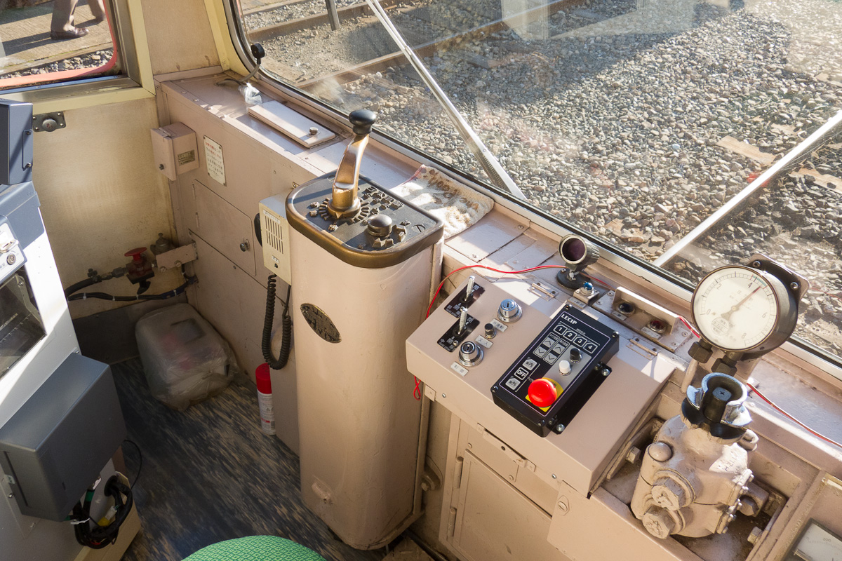 豊橋鉄道東田本線モ3500形の運転台。